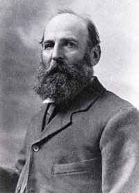 Koos De La Rey